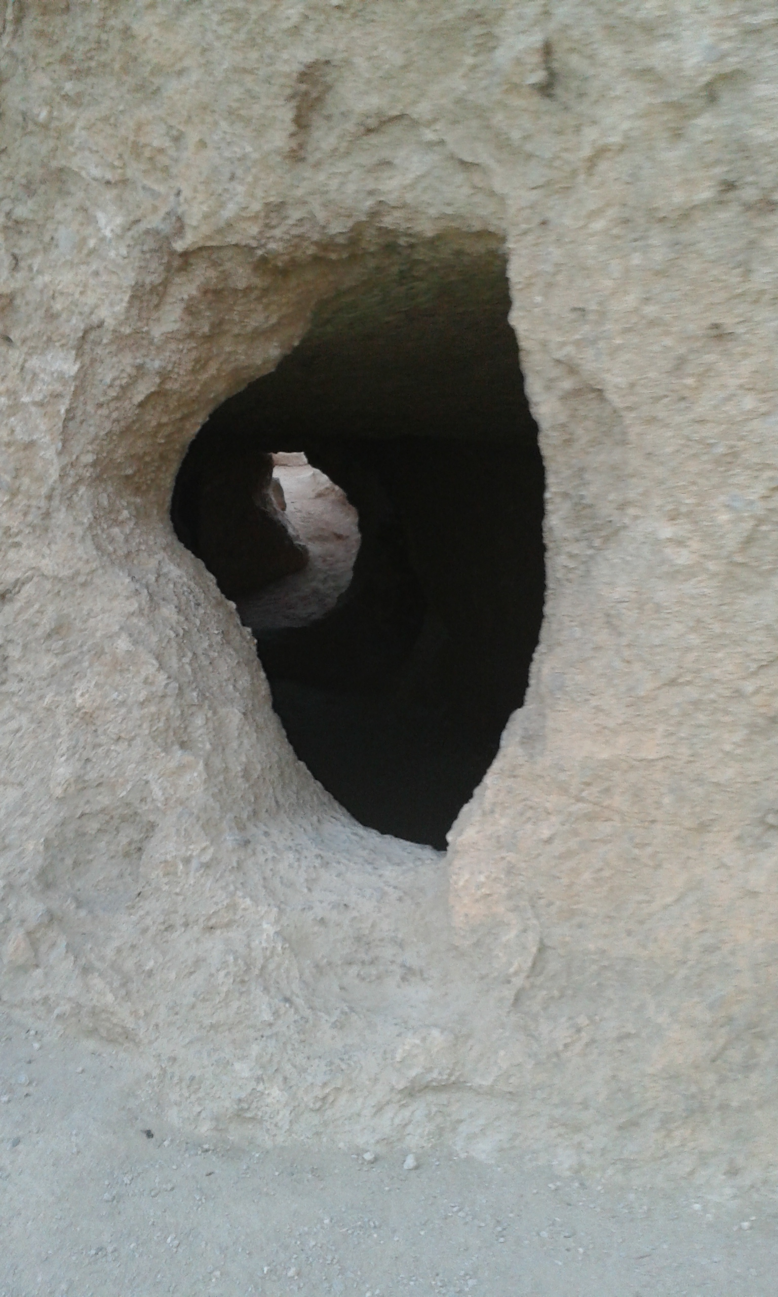 نمایی از ورودی غار سنگی حسین کوهکن